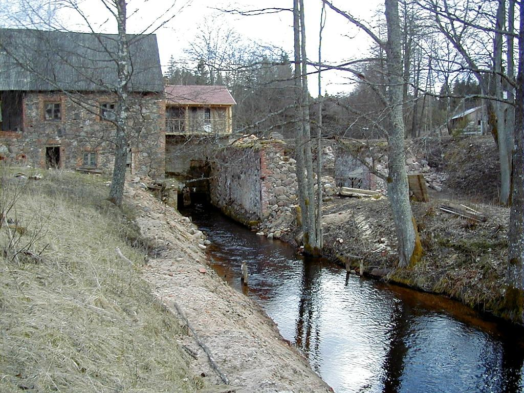 Mordangas dzirnavas. 2000-04-15